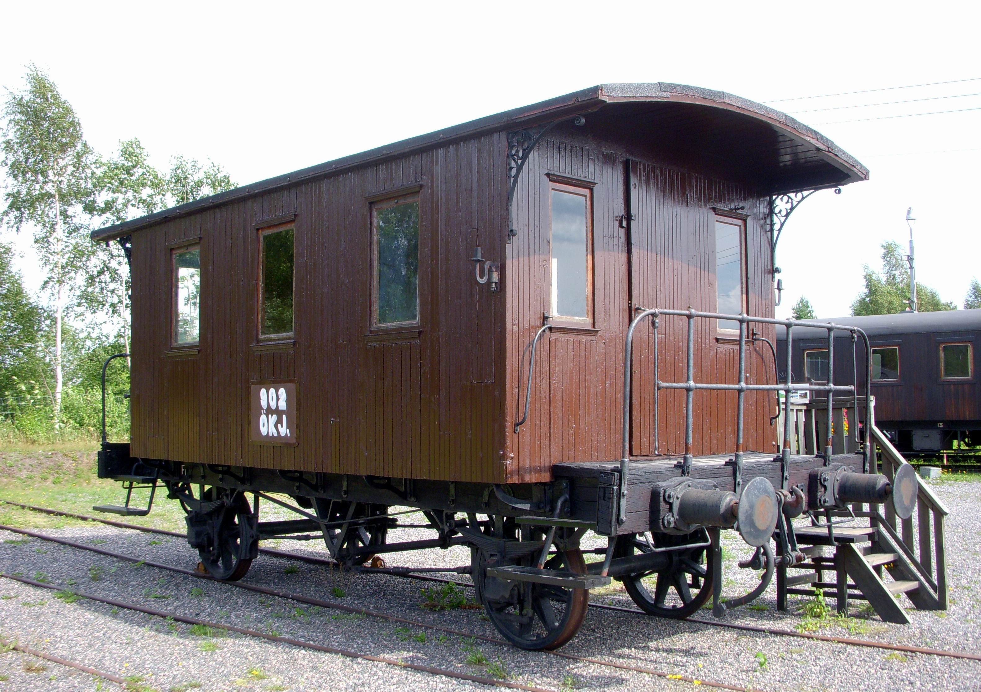 Lokmuseet i Grängesberg, "malmtågsfinkan" ÖKJ litt F1 nr 902, delar av vagnen härstammar från år 1856